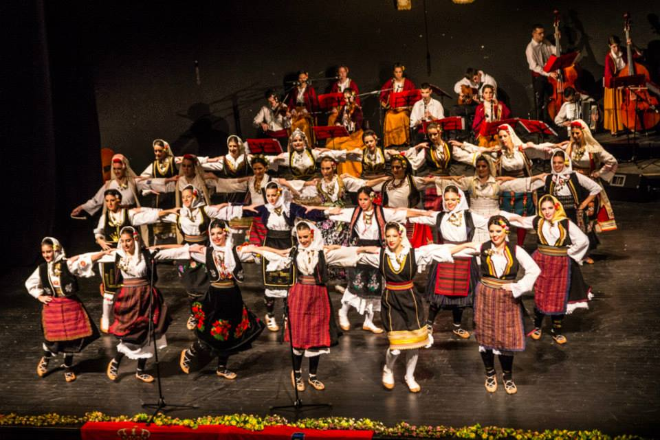 Godišnji koncert